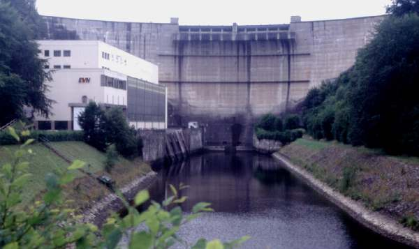 Die Staumauer des Kraftwerks Ottenstein.